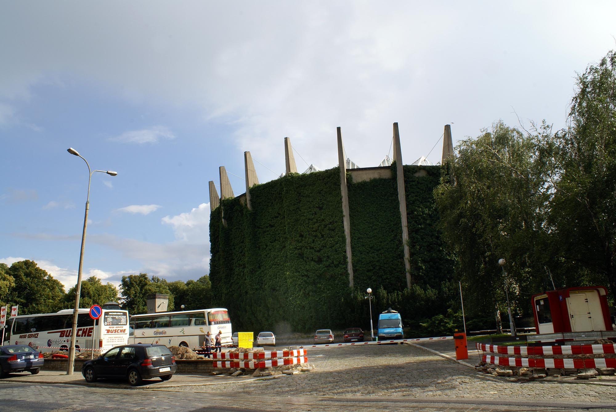 Wrocław, zespół budynków Panoramy Racławickiej z otoczeniem (teren)